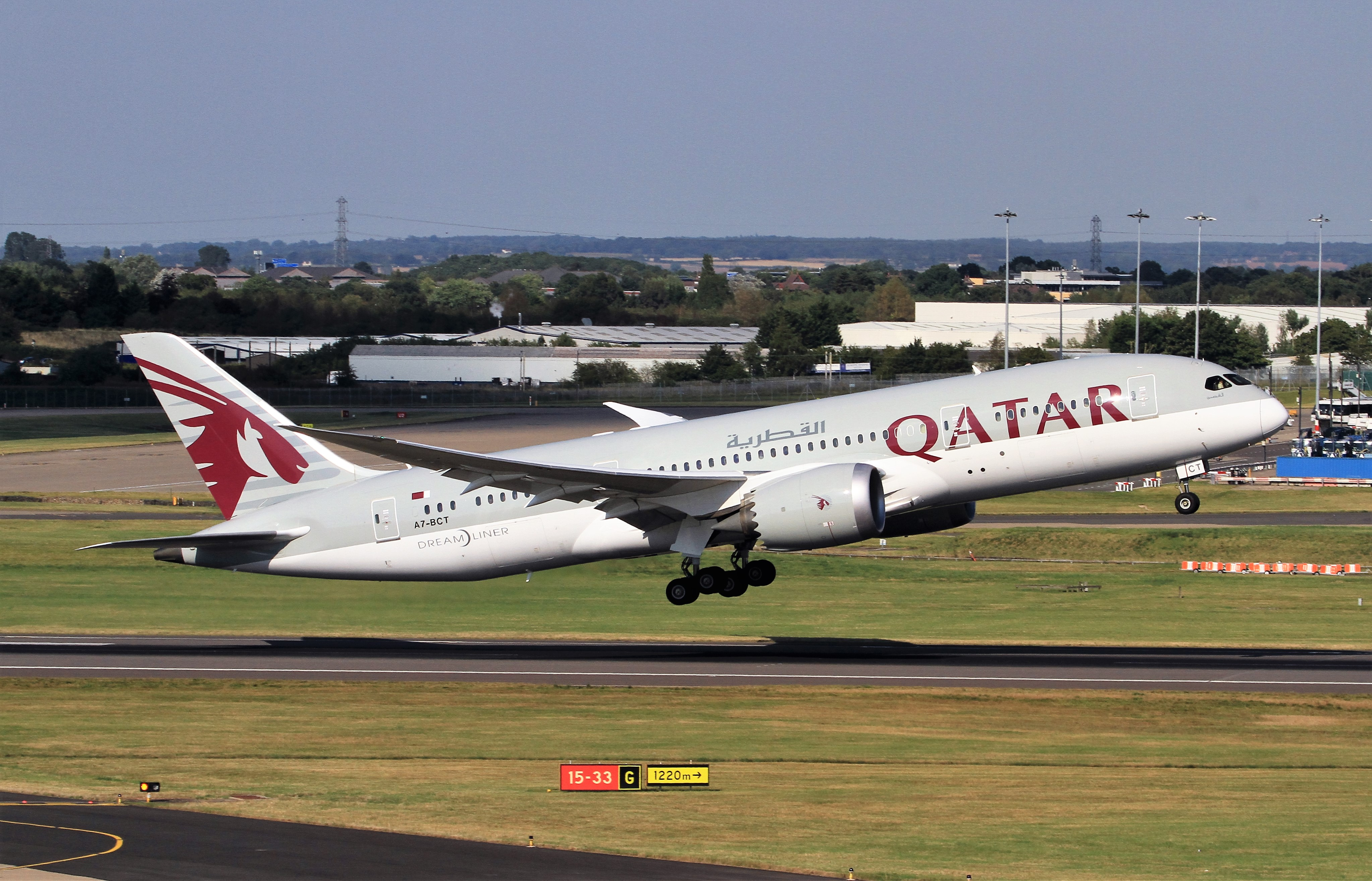 A7-BCT Boeing 787-8 Qatar Birmingham 30-08-2016